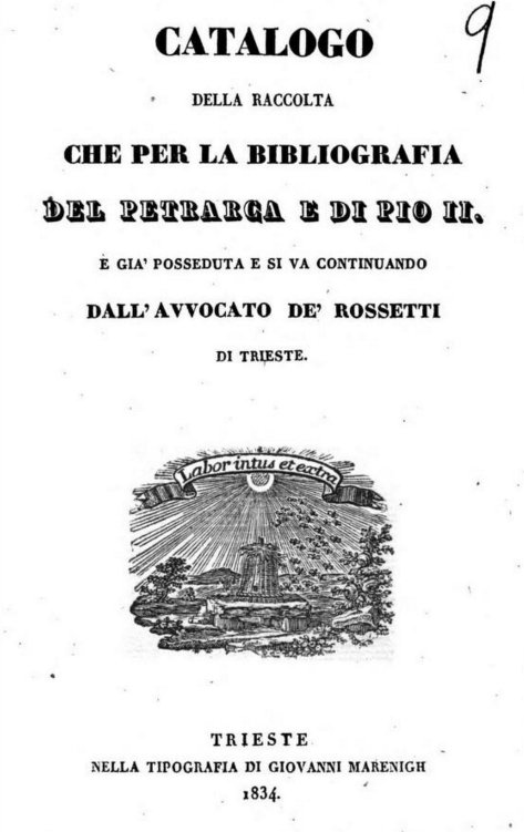 frontespizio del Catalogo del diciannovesimo secolo di Domenico Rossetti De Scander tratti da Internet Archive